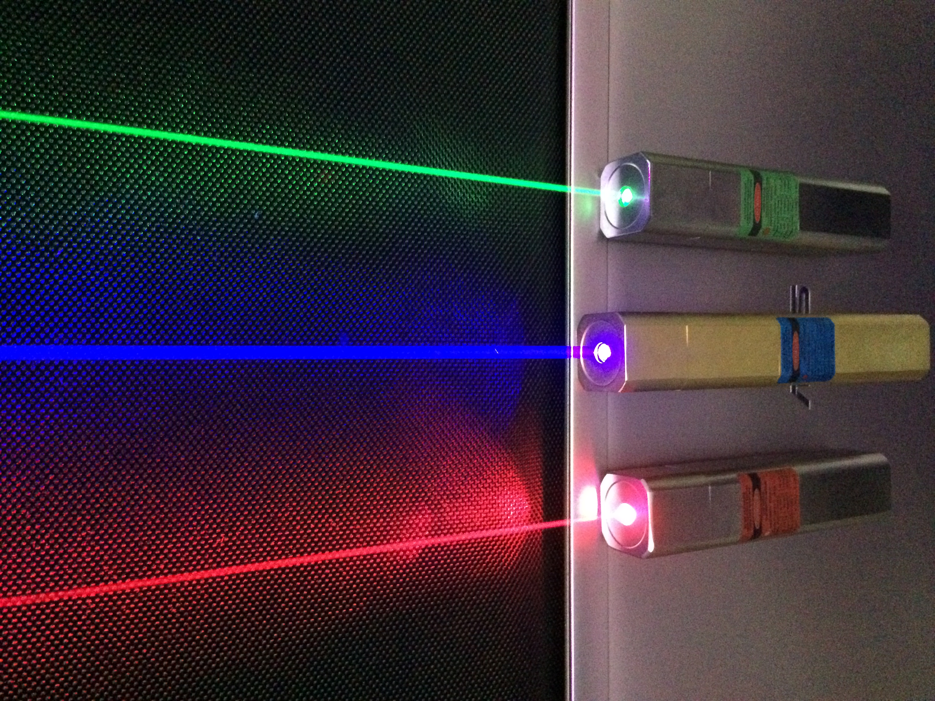 Q-LINE Laser pointers